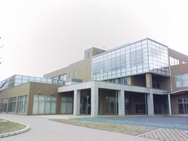 西部市民センター